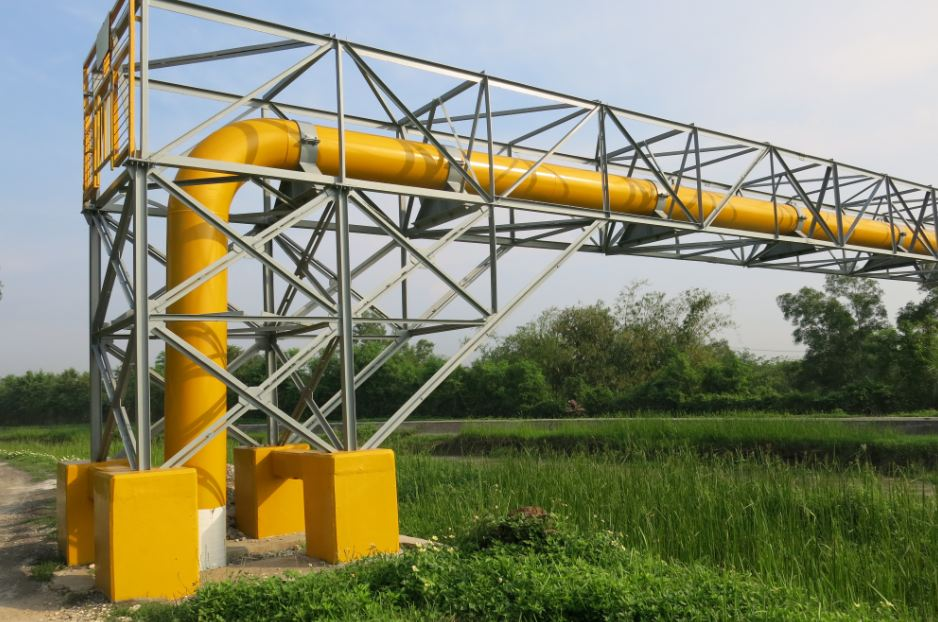 Tuyau de la compagnie gazière d'Etat indonésienne PGN